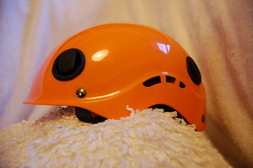 Un casque d'esclade black diamond.